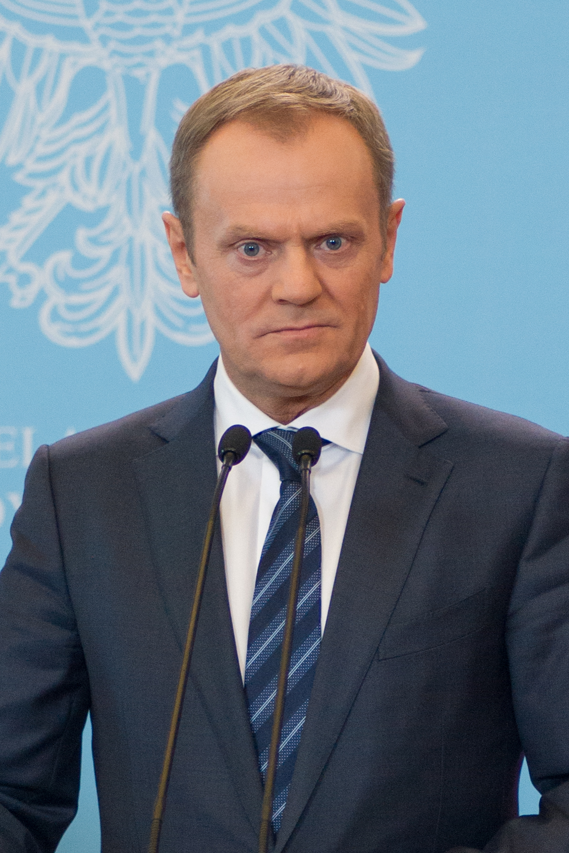 Donald Tusk, 2014, Kancelaria Prezesa Rady Ministrów, Warszawa